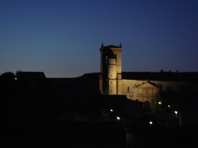 Vista nocturna de la iglesia de San Martín de Rubiales (Burgos, España)